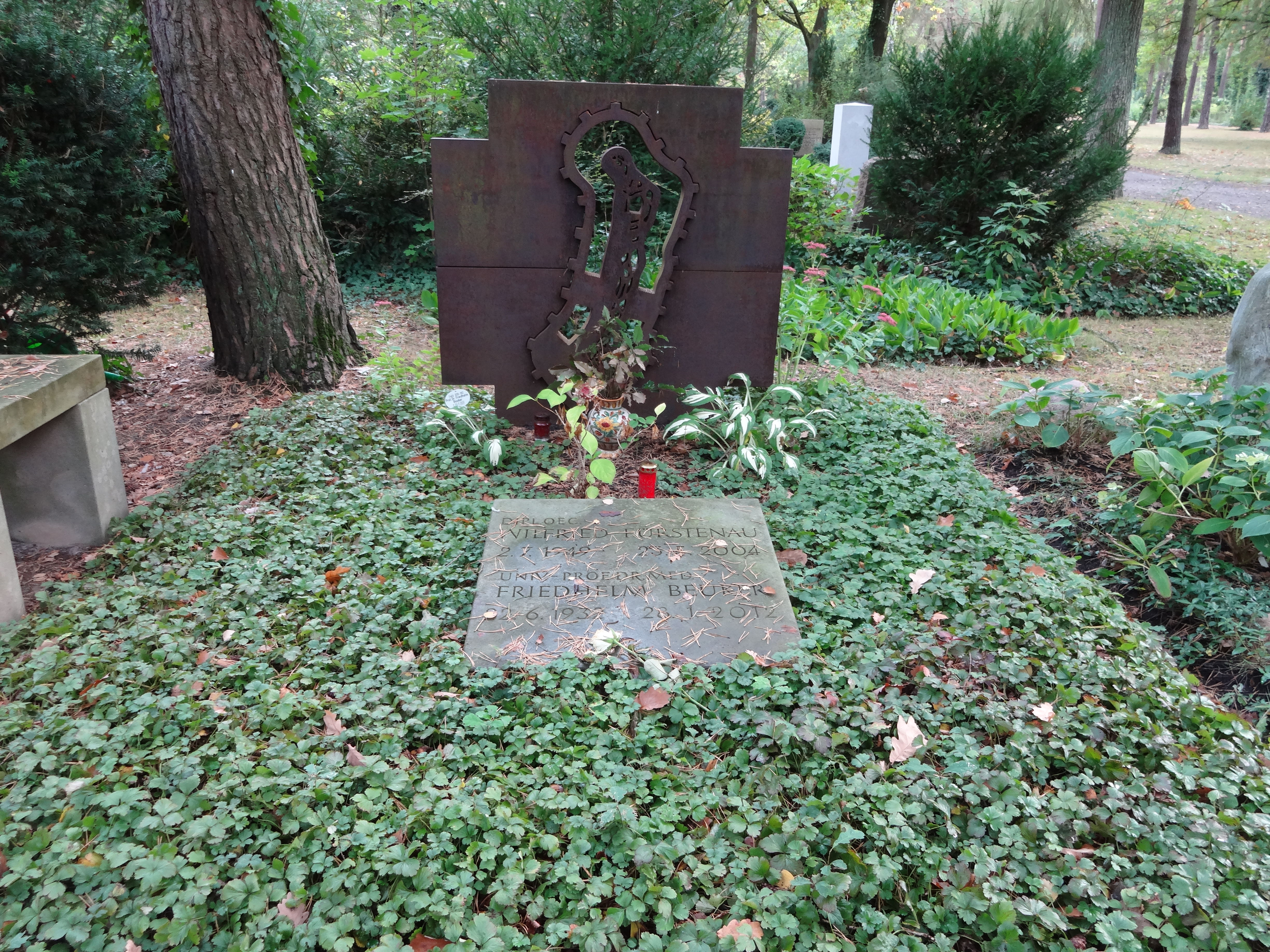 Grab von Prof. Friedhelm Beuker auf dem Waldfriedhof Zehlendorf